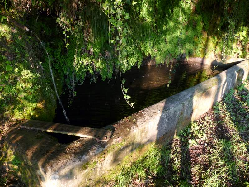 Korito Močila v Avčah z redko sredozemsko praprotjo Venerinimi laski (Adiantum capillus veneris L.).